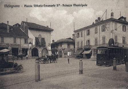 Melegnano - Cartolina tram